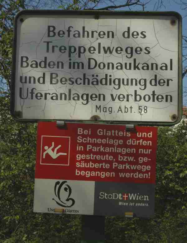 Verbotsschild am Donaukanal